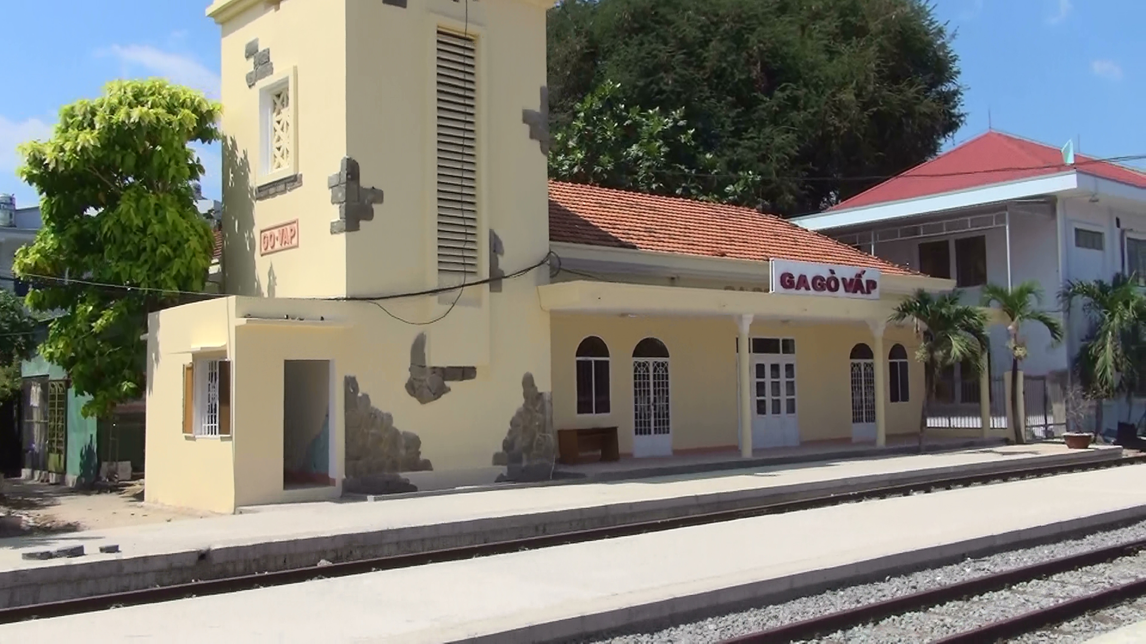 ベトナム南北統一鉄道ゴヴァップ駅